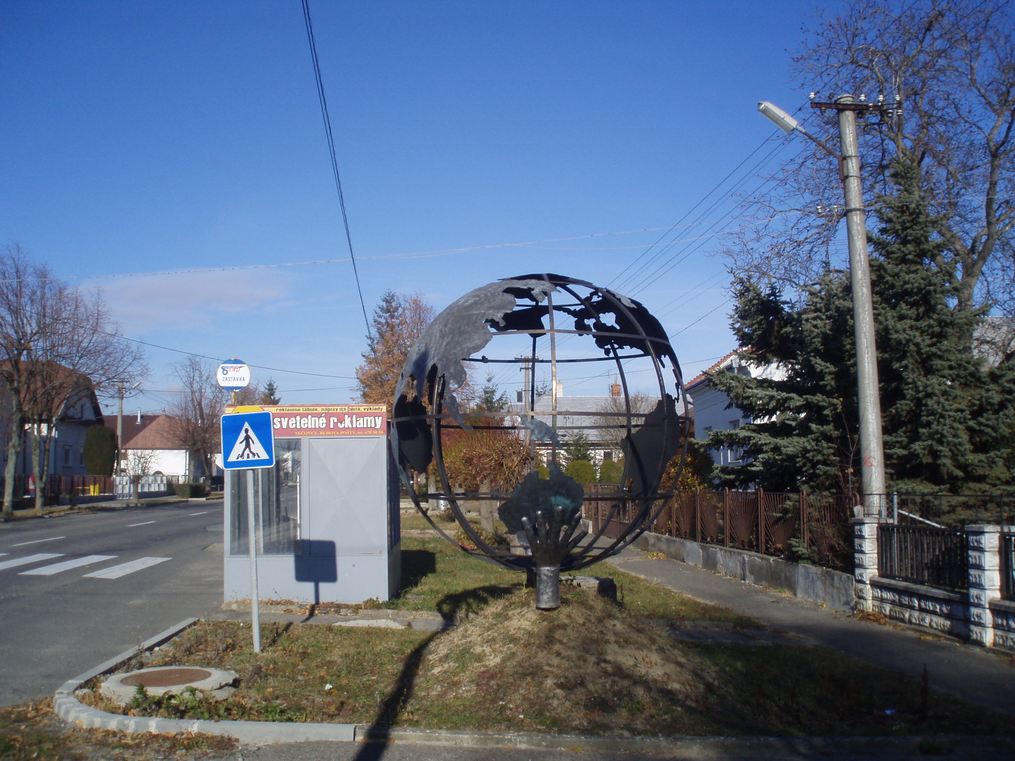 Fotografia zastávky Sad a modelu zemegule v obci Nový Ruskov.